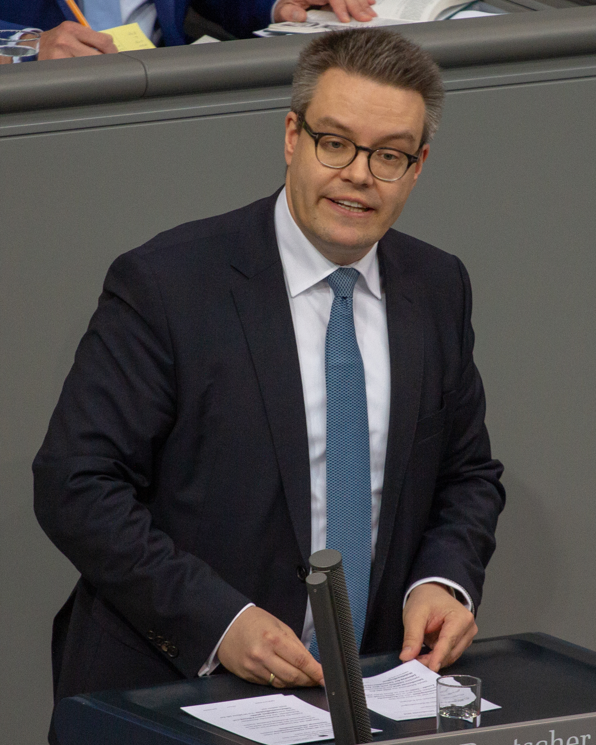 Tobias Lindner, Mitglied des Deutschen Bundestages, während einer Plenarsitzung am 12. April 2019 in Berlin.